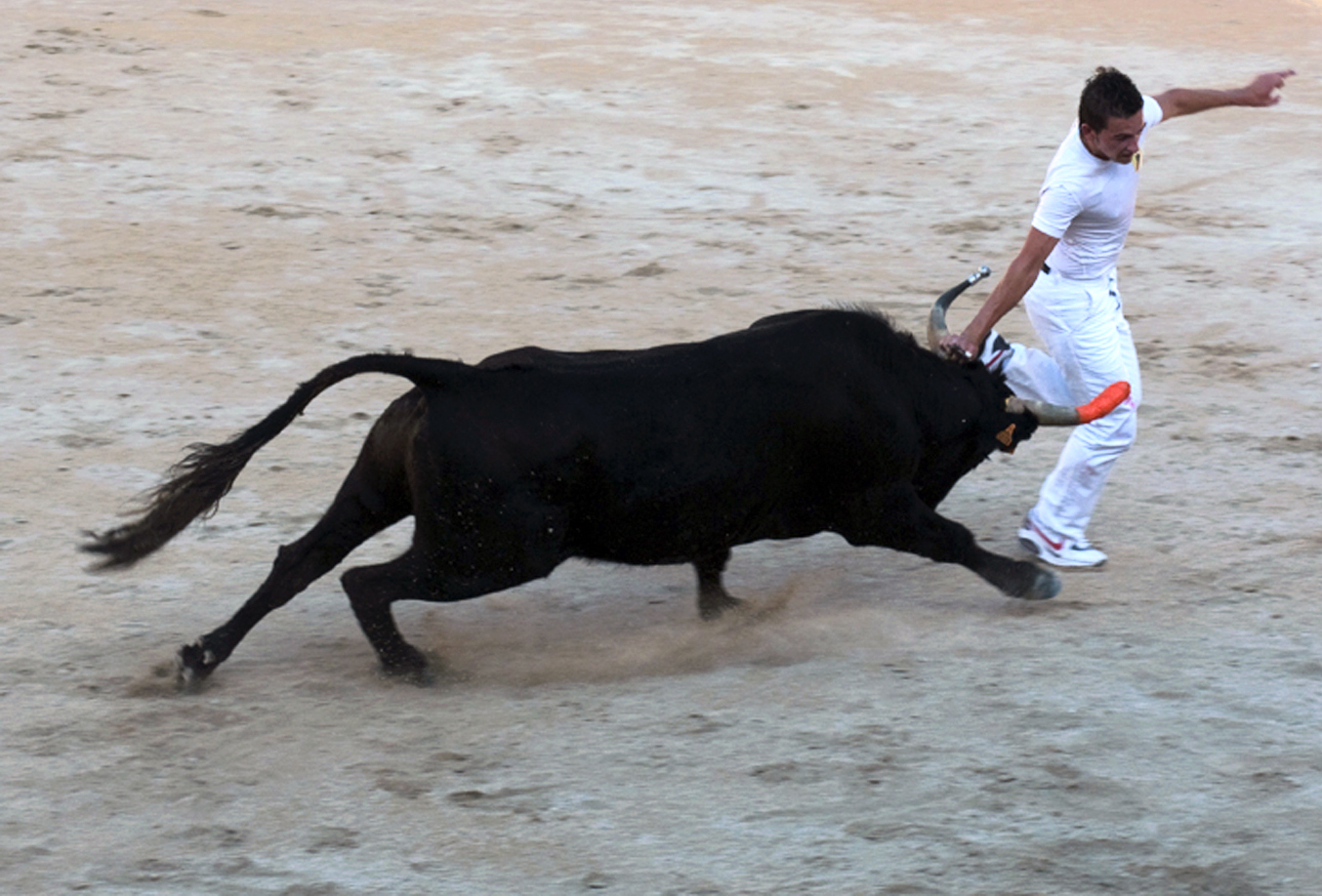 Razet réussi